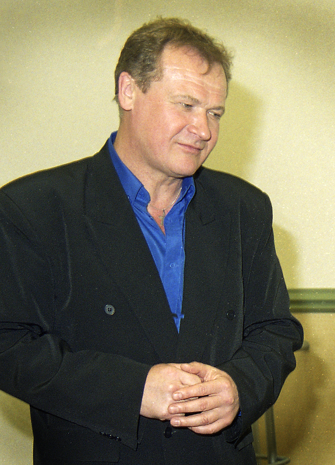 Väino Puura, laulja (bariton) 2001